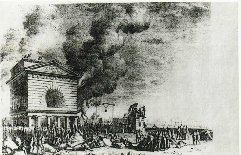 Gravure imprimée- XIXe